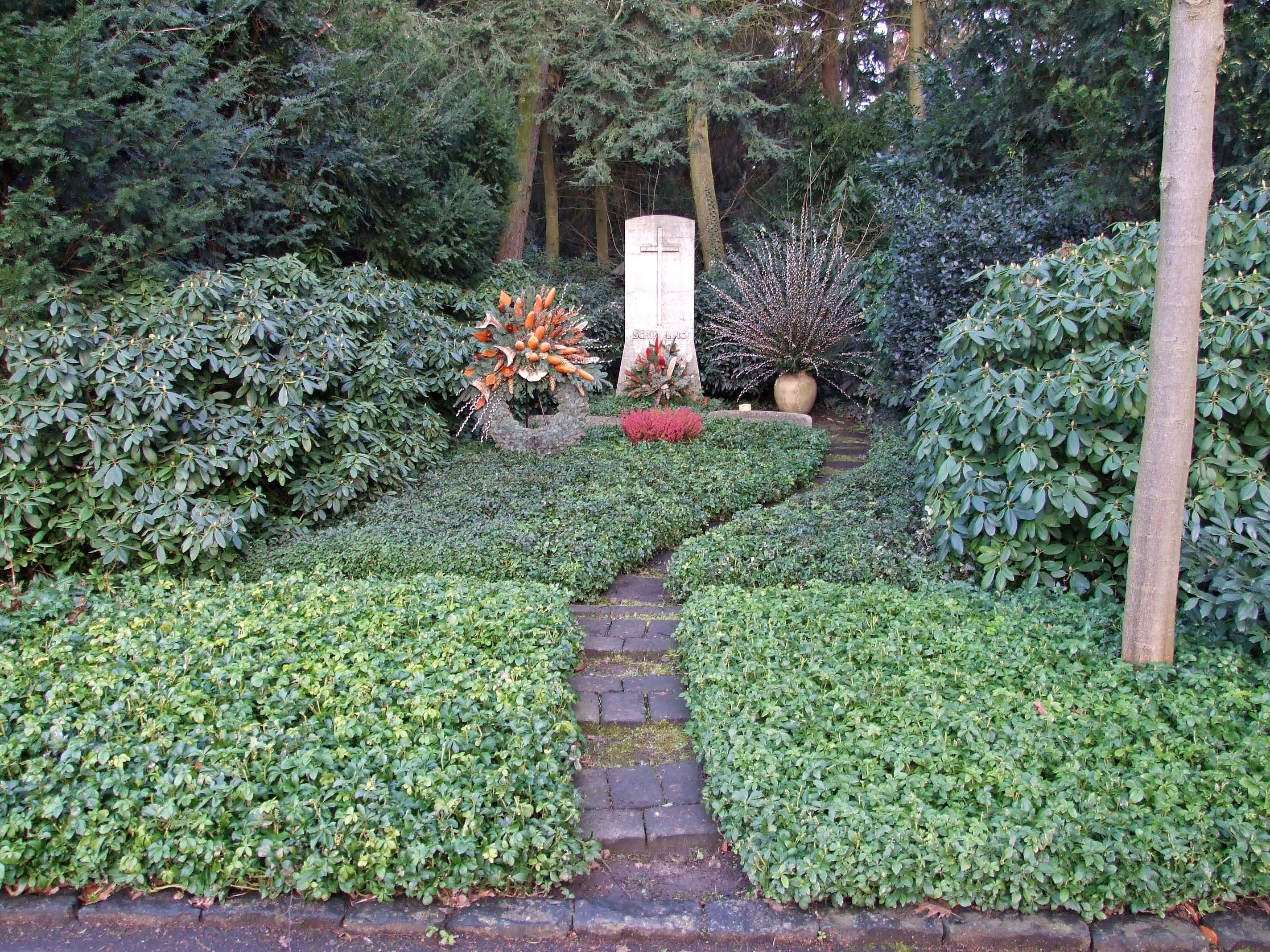 Familiengrab Schindling-Linsenhoff (Adolf Schindling Gründer der VDO)